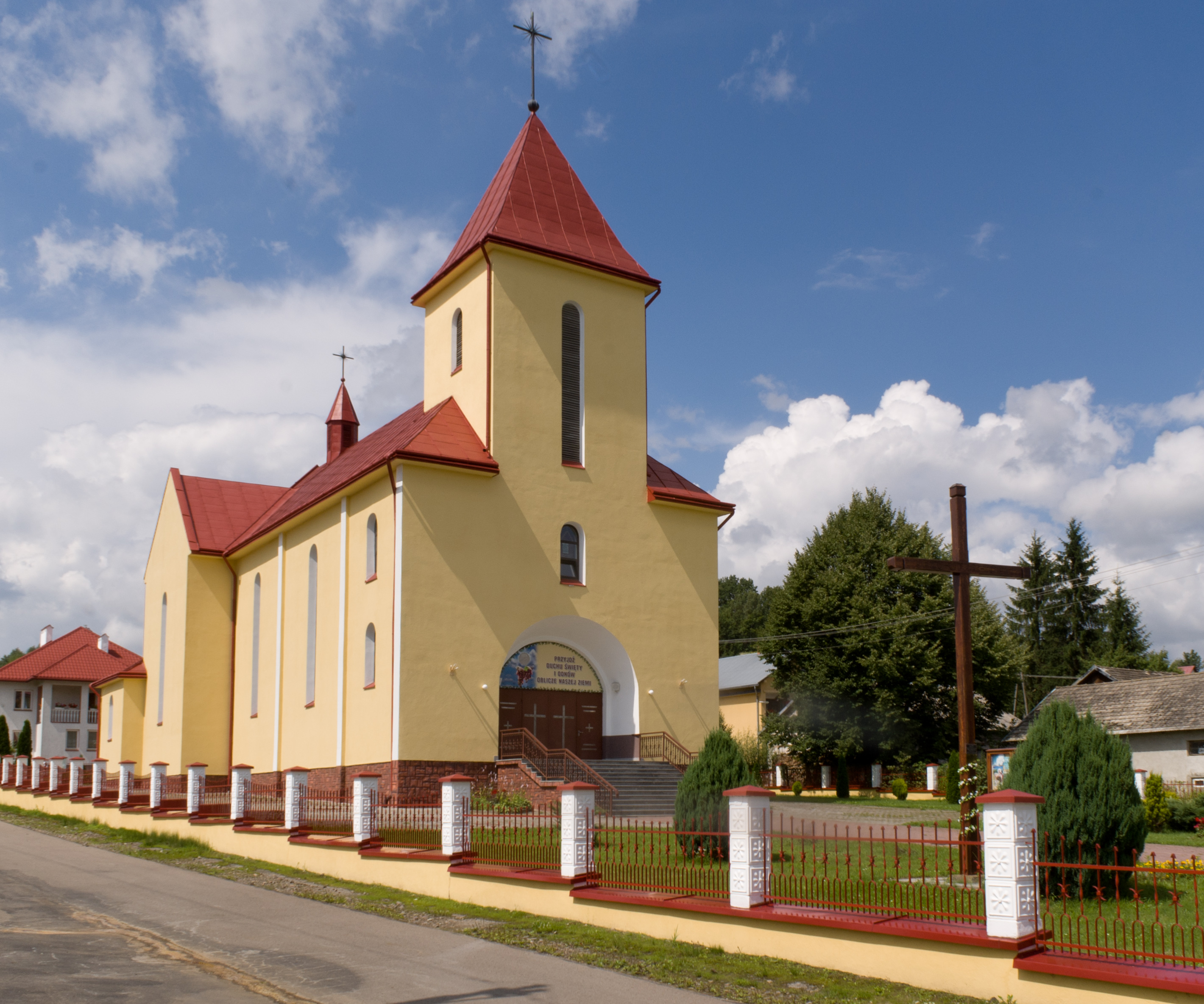 Kościół pw. Matki Bożej Nieustającej Pomocy w Nienadowej